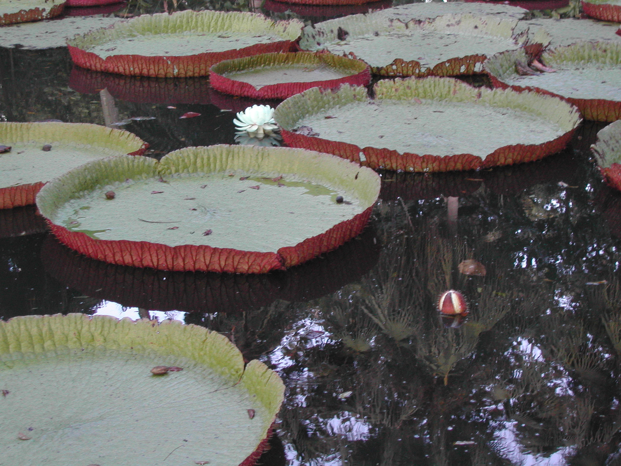 Photo des célèbres nénuphars du Jardin de Pamplemousses, à l'île Maurice. Victoria amazonica × Victoria cruziana, possibly 'Longwood Hybrid'.